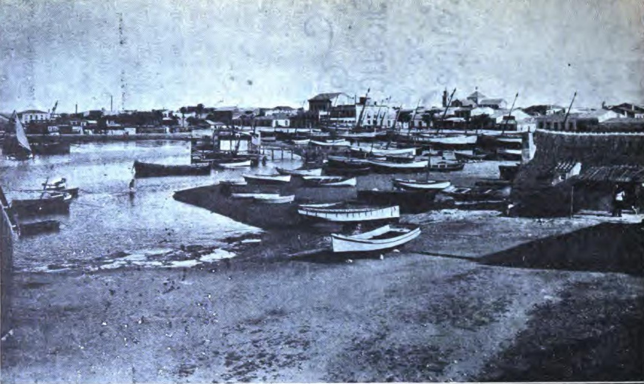 Torrevieja: Vista general de Torrevieja desde el puerto